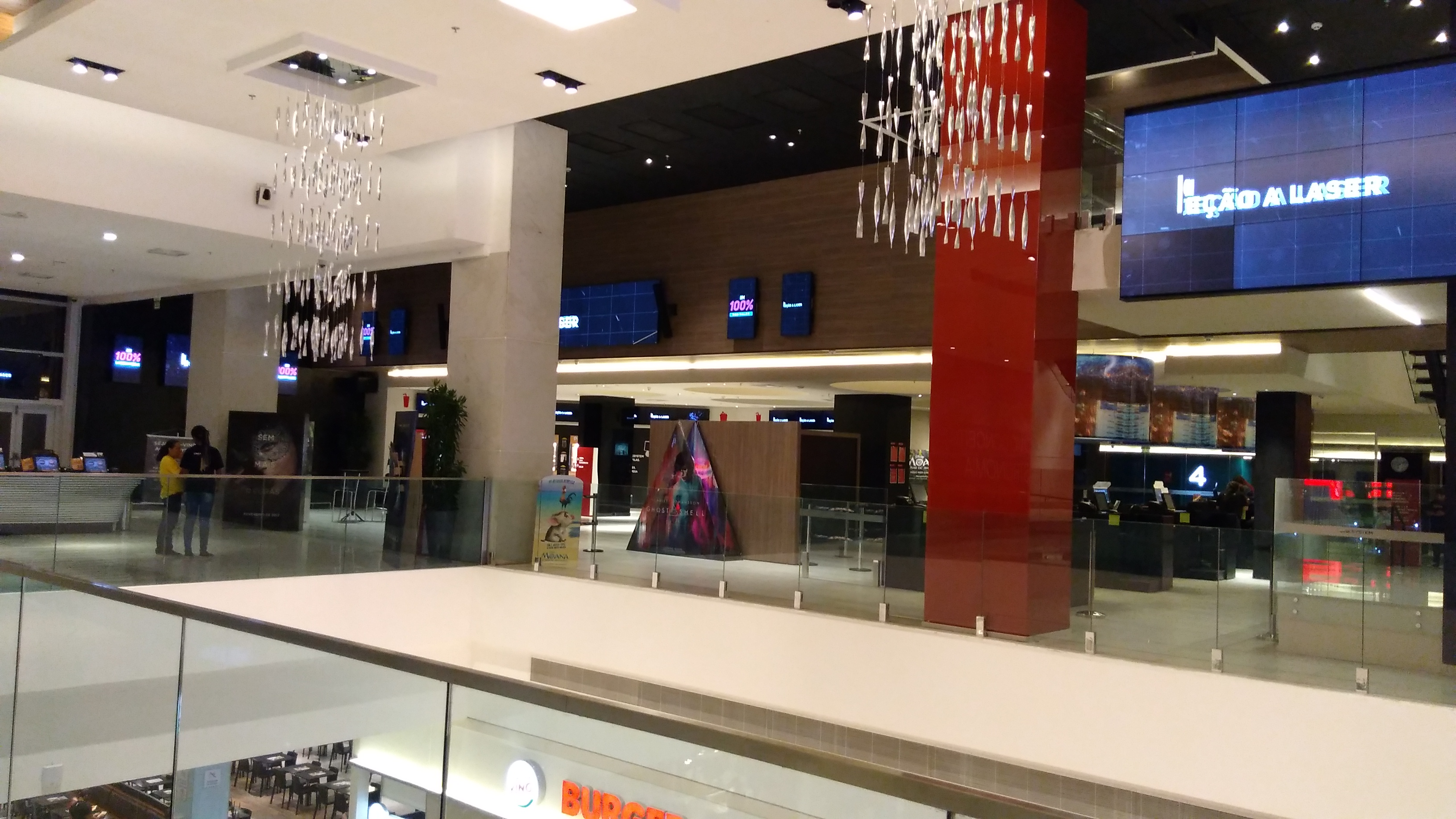 Área externa do Cinesystem Morumbi Town de São Paulo, SP